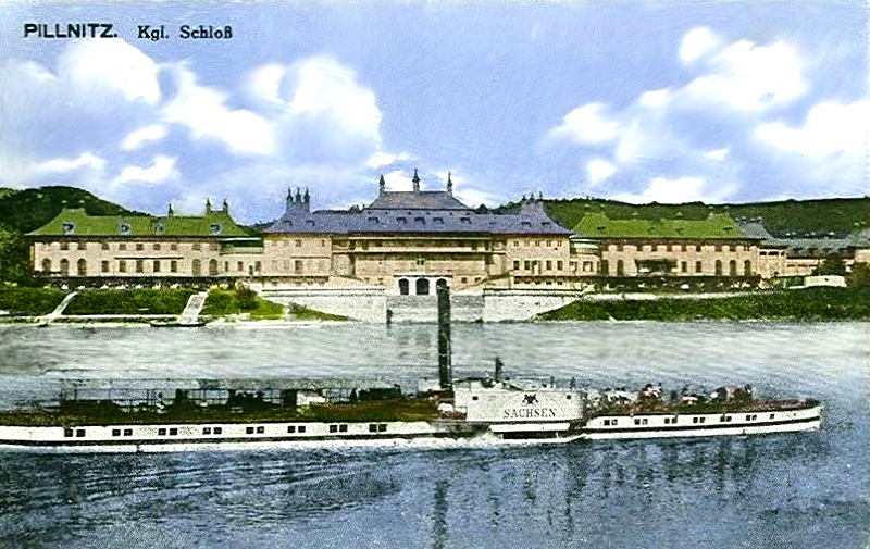 Dampfschiff Sachsen